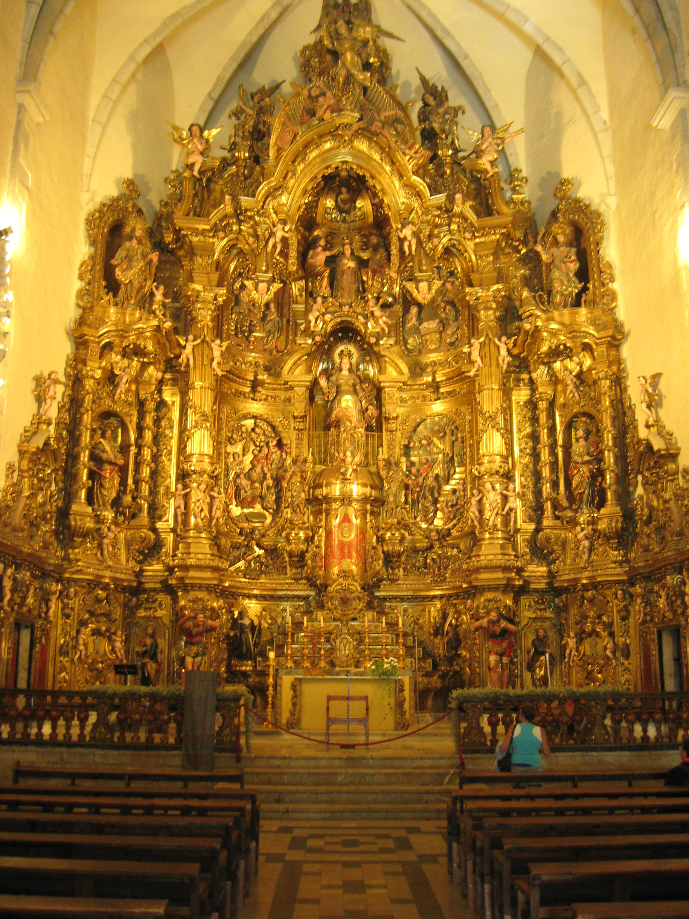 Barockaltar aus dem 18. Jahrhundert in der gotischen Kirche "Santa Maria" von Cadaques (Höhe 23 Meter; Breite 12 Meter) Datum: 22.09.2010 Urheber: Michael Pfeiffer alias Benutzer:Gordito1869 Quelle: privates Fotoalbum des Urhebers